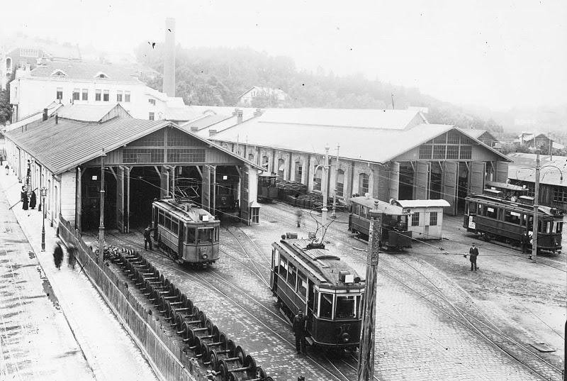 Врм_(вагоно-ремонтні_майстерні).jpg: львів вагоно-ремонтні майстерні